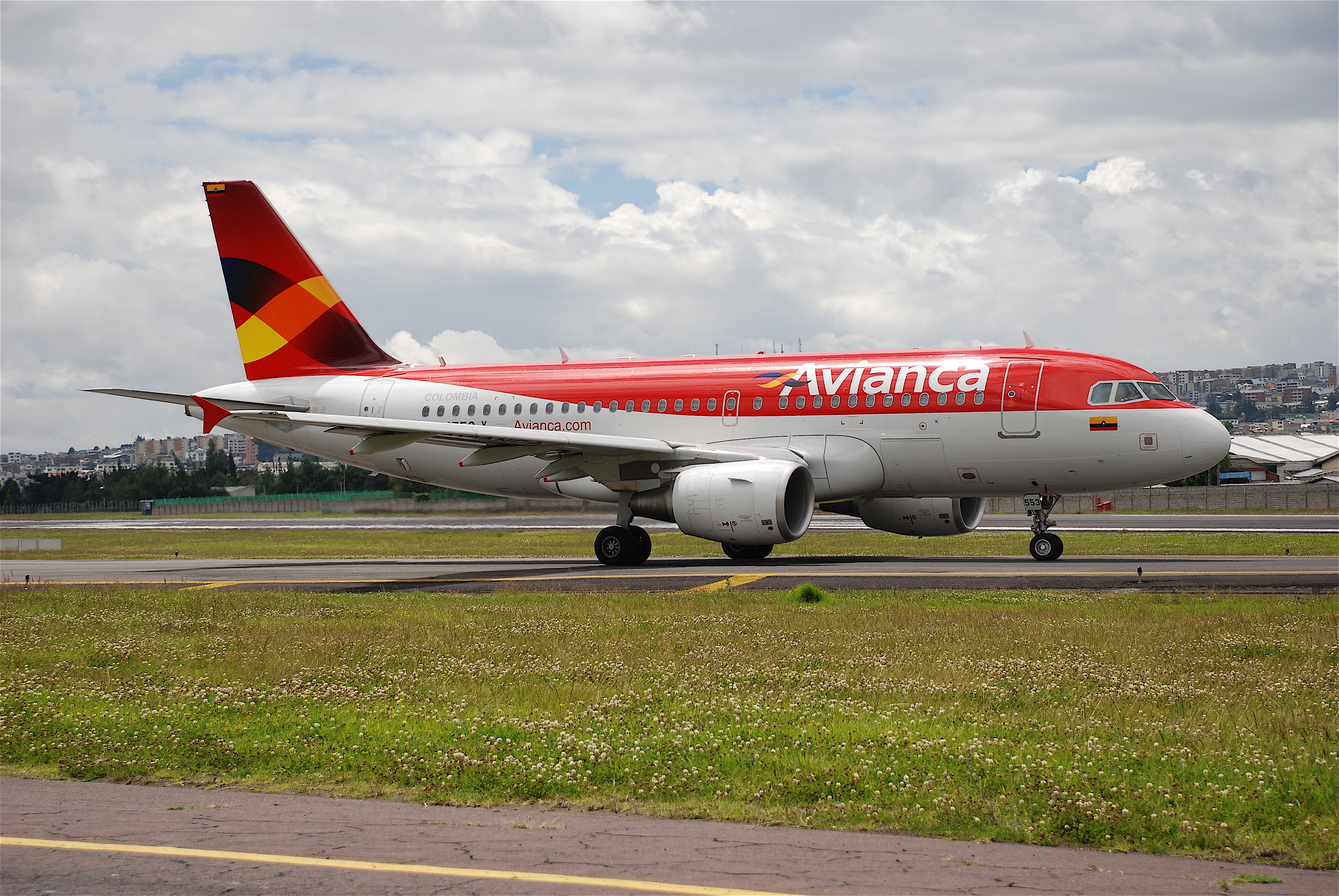 Avianca Airbus A319-112; HK-4553-X515ah